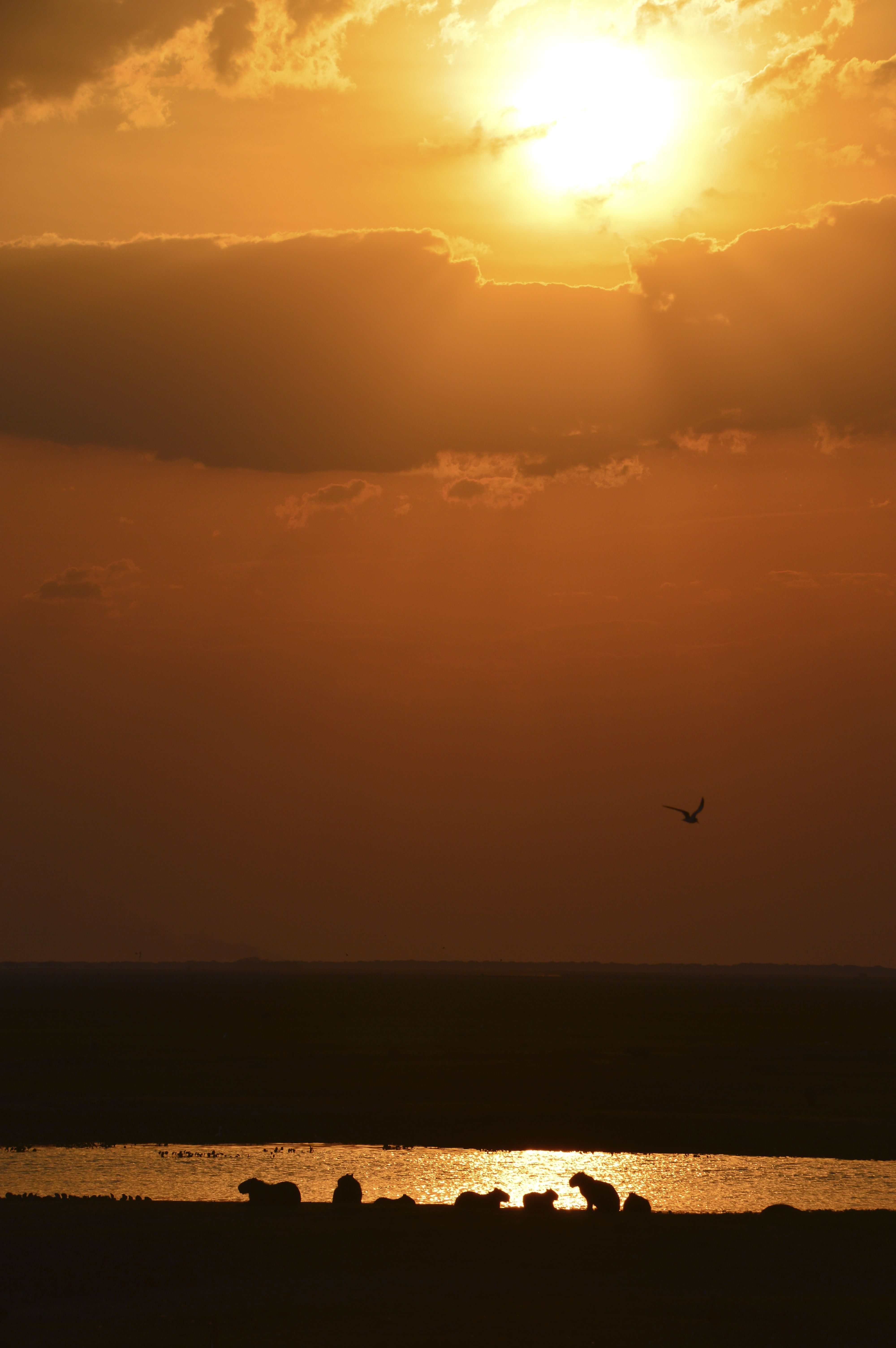 Esta foto fue tomada en los módulos agroecológicos del Hato El Cedral en el Estado Apure, el cual nos brindo un maravilloso atardecer con la silueta de un grupo chigüires descansando a orillas de una laguna